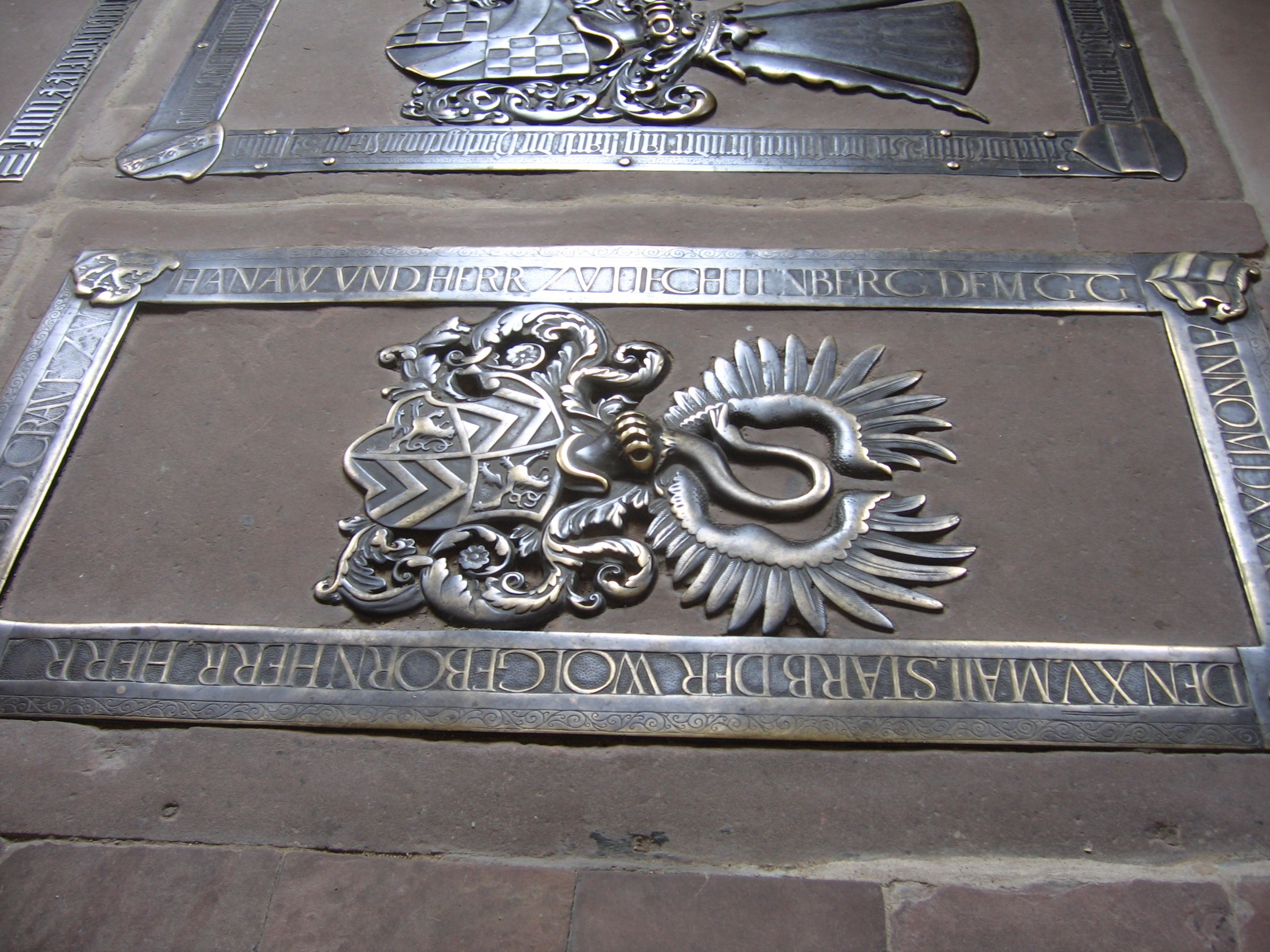 Stadtkirche Babenhausen, Grabplatte der Sibylle von Baden